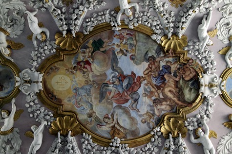 Opera tratta dall'affresco del Baciccia, presente nella chiesa del Gesù di Roma